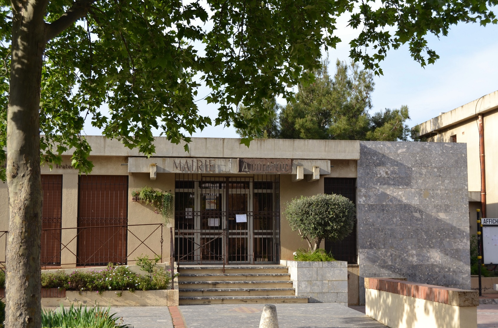 La Mairie